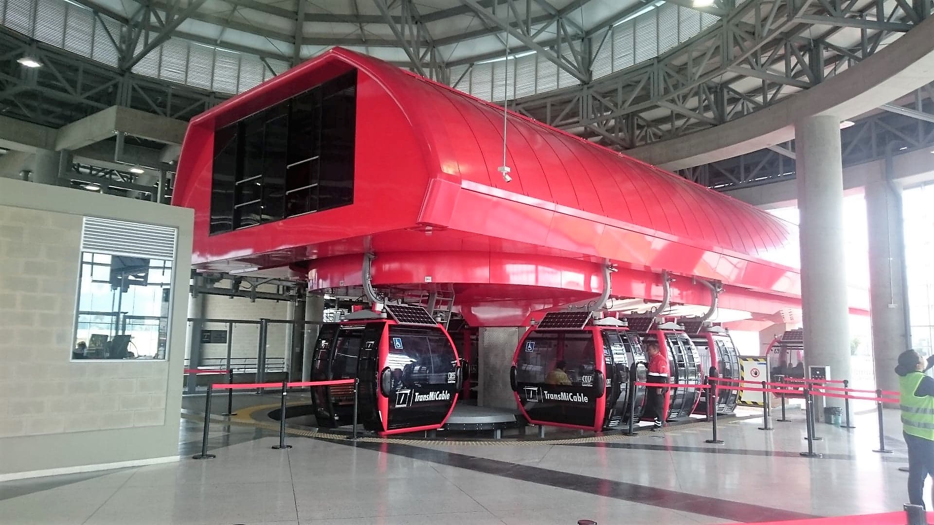 TransMiCable